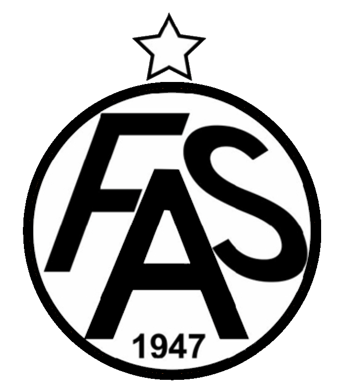 Logo CD FAS Clausura 2014